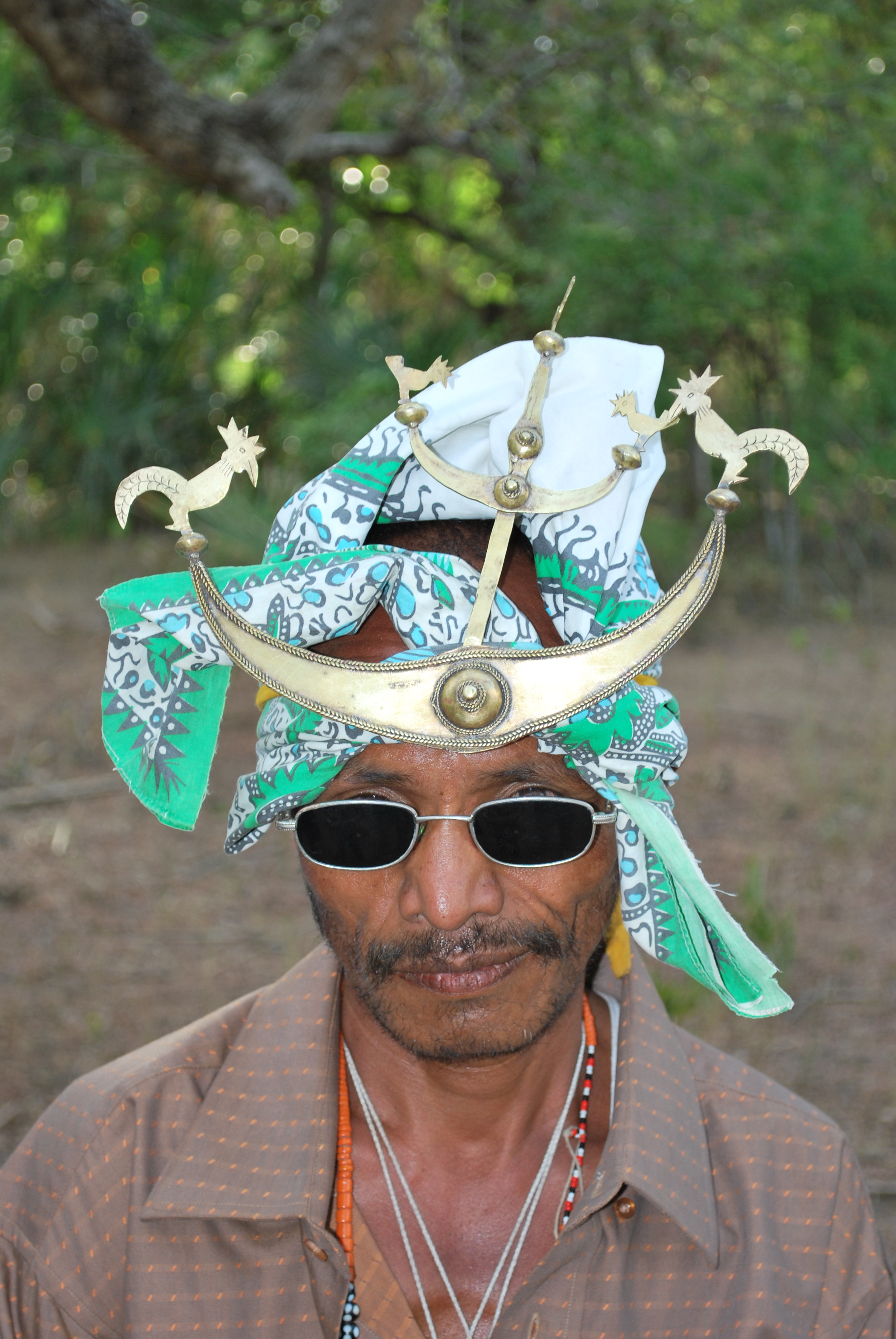 Morador from Licore, Laclo, Manatuto